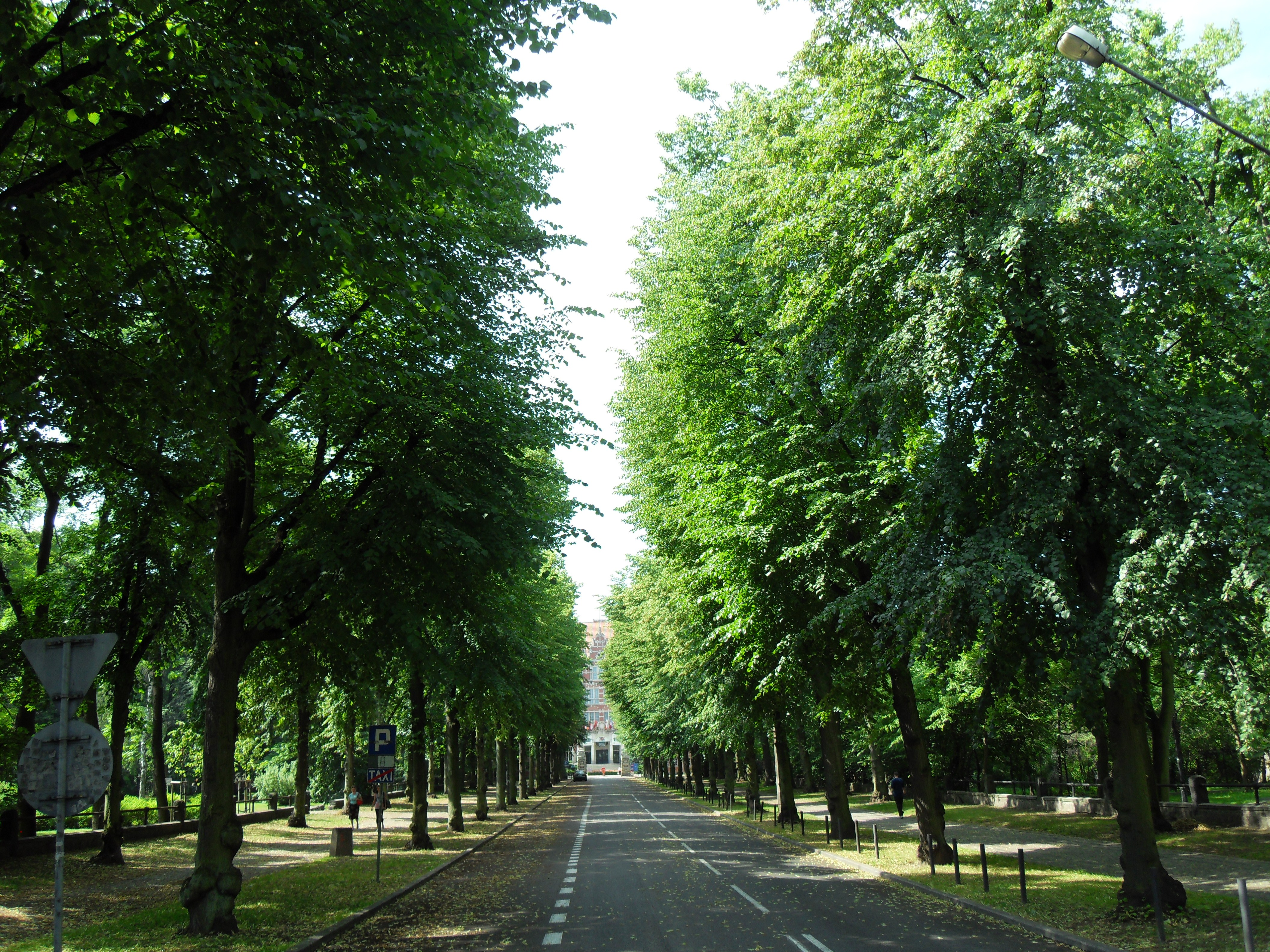 Gdańsk Wrzeszcz, ul. Narutowicza. 04.1979.